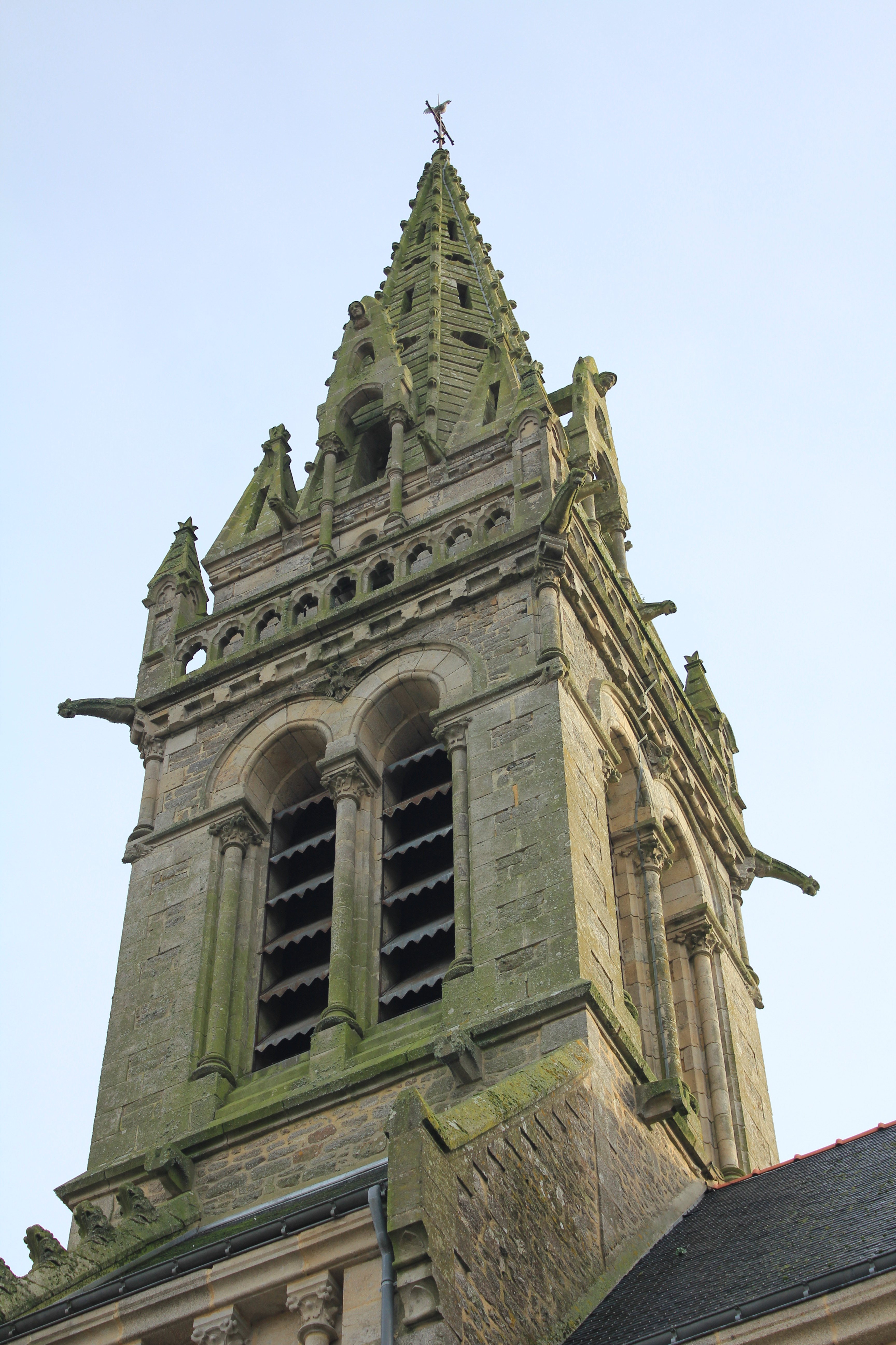 Église Saint-Clair (Réguiny) : clocher